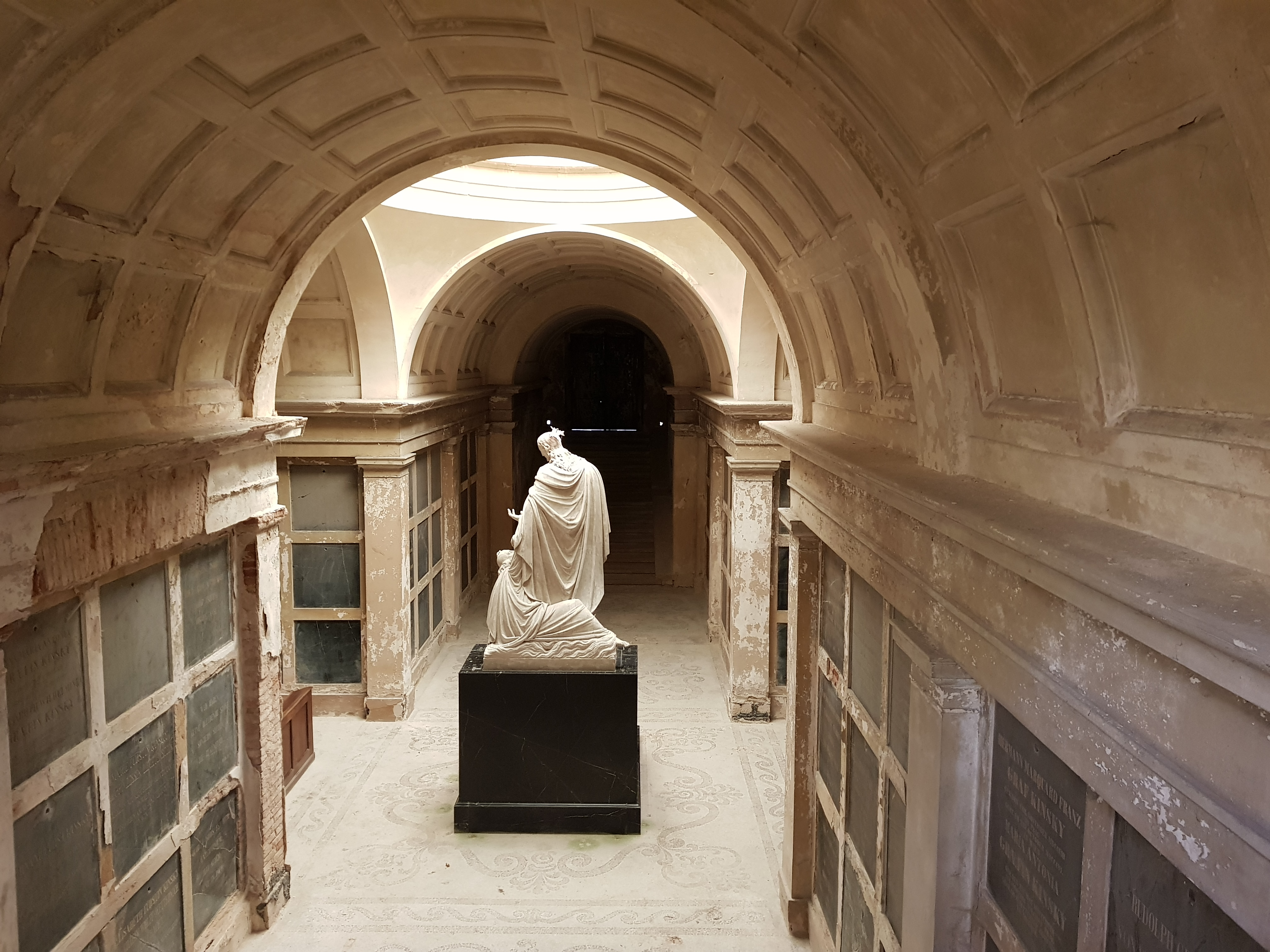 Hrobka Kinských v Budenicích